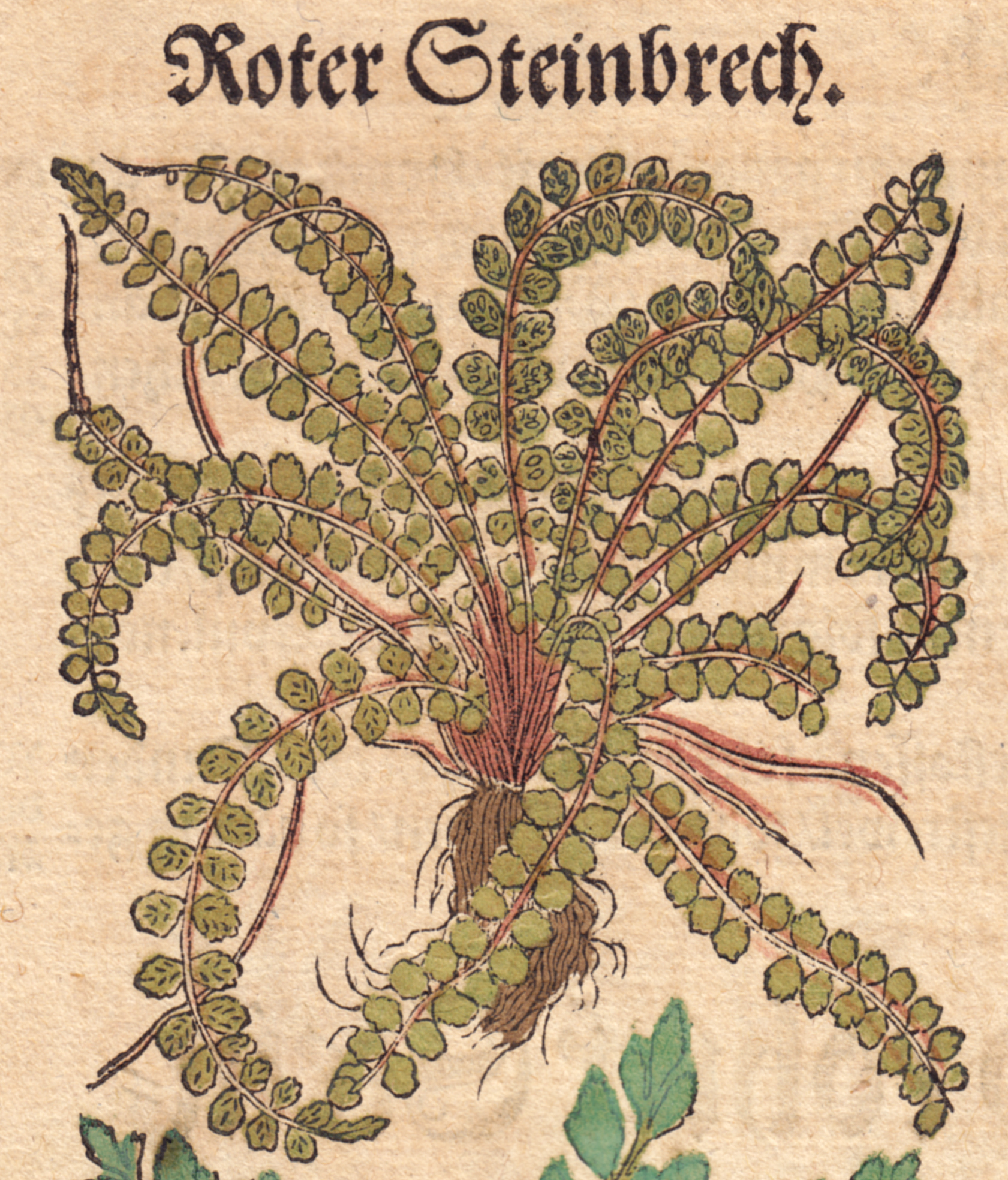 Steinbrech